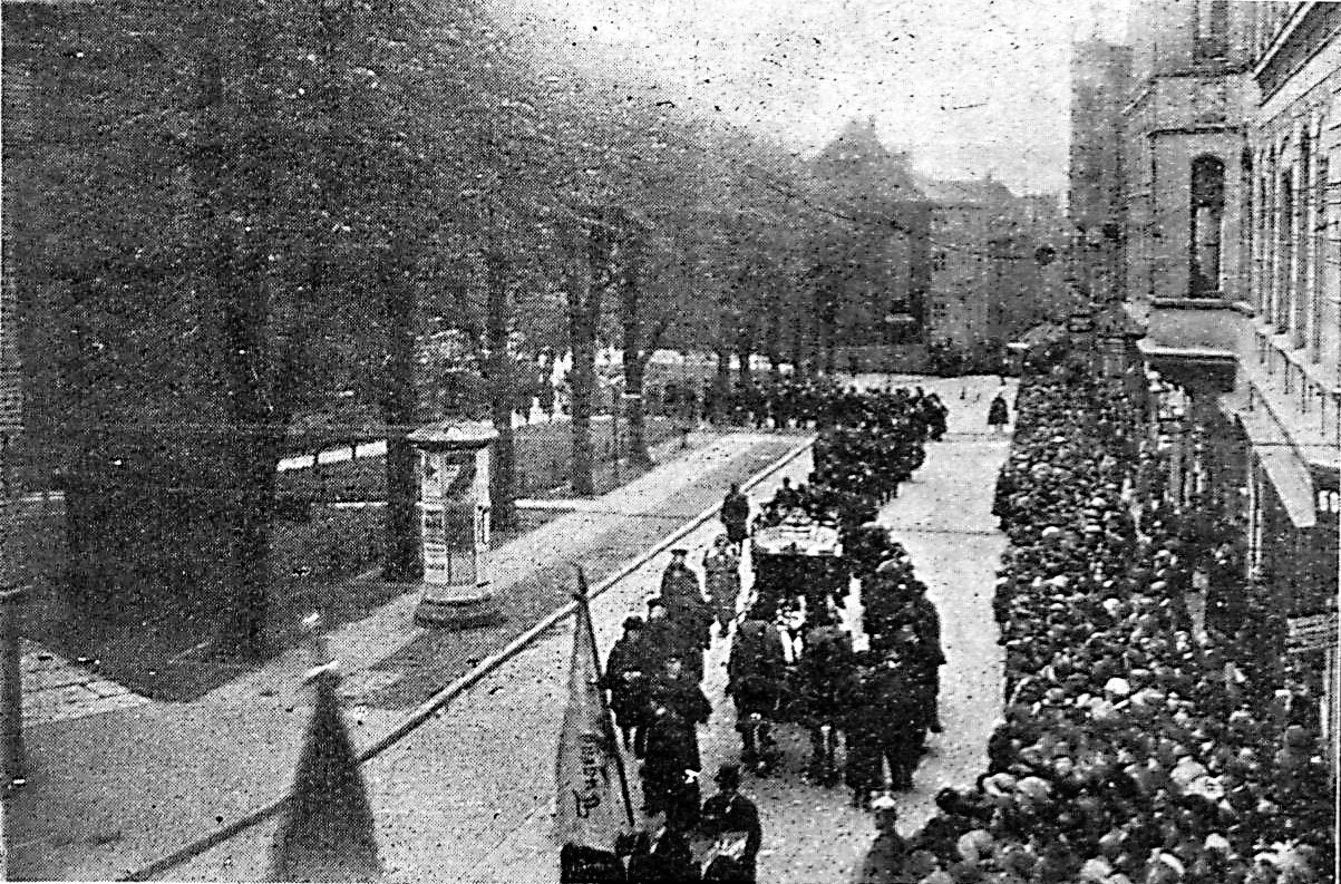 Aus der Marienkirche kommender Trauerzug Carl Dimpkers auf den Weg zum St. Jürgen-Friedhof.